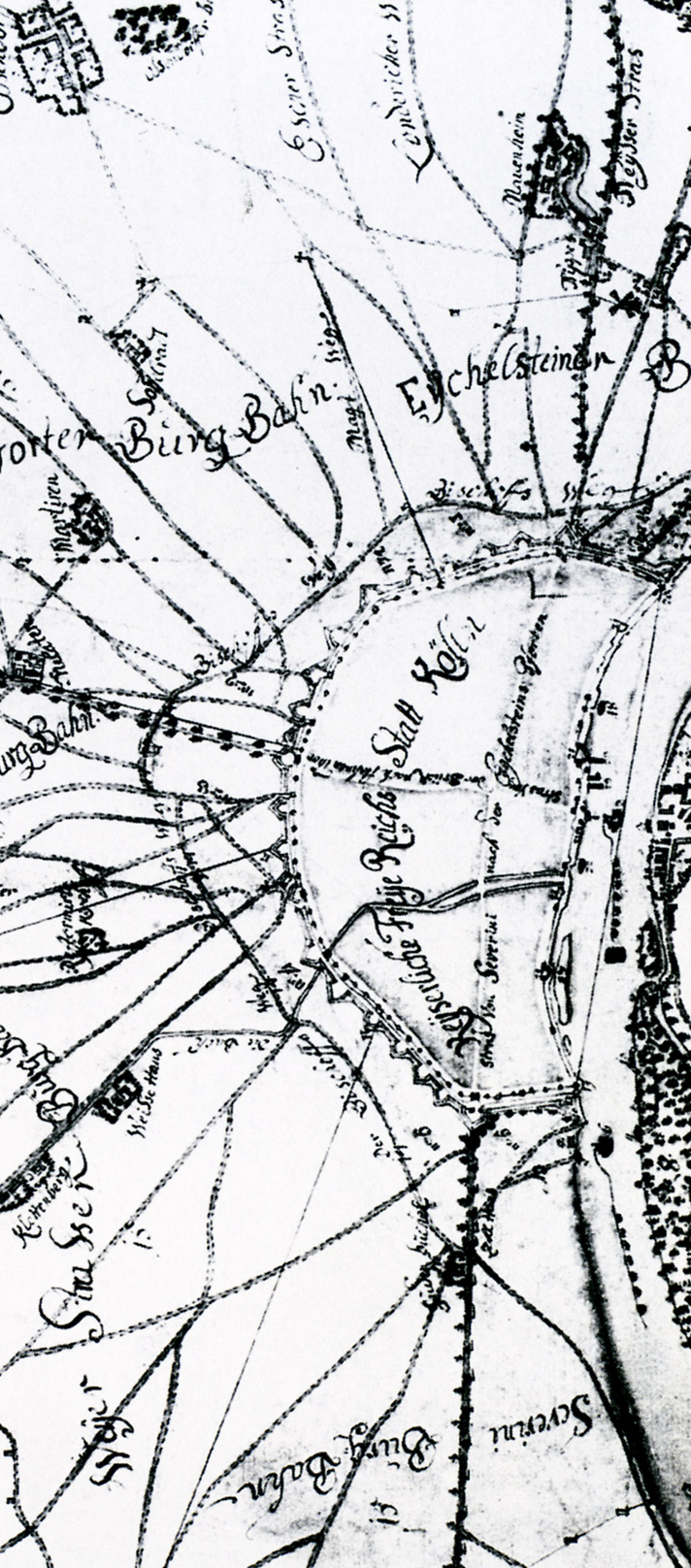 Köln im Mittelalter, nach dem Plan über den Kölner Schweid